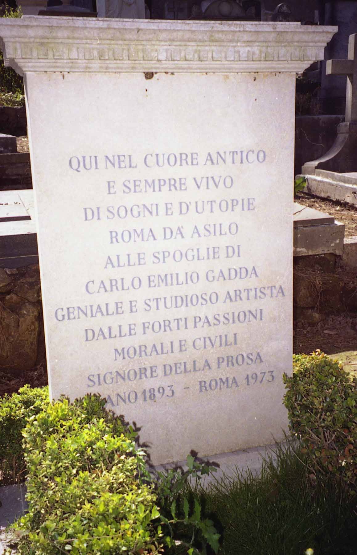 Tomba dello scrittore Carlo Emilio Gadda (1893-1973) al Cimitero acattolico di Roma.